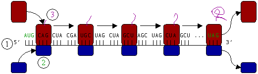 Robosomer i arbete längs en budbärar-RNA-molekyl. Kopierat från engelska Wikipedian. {| border="1" ! date/time || username || edit summary |---- | 7 juli 2005 kl.09.03 || :sv:Användare:Elinnea || |---- | 12 september 2004 kl.18.08 || :sv:Användare:Sten André